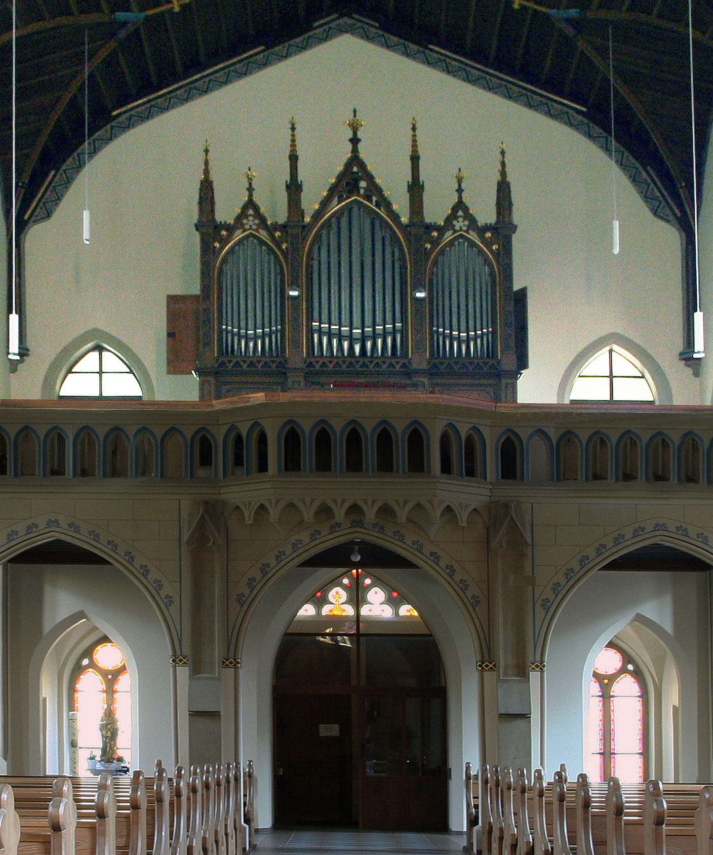 Röm.-kath. Pfarrkirche St. Bonifatius Bad Wildbad, Orgel